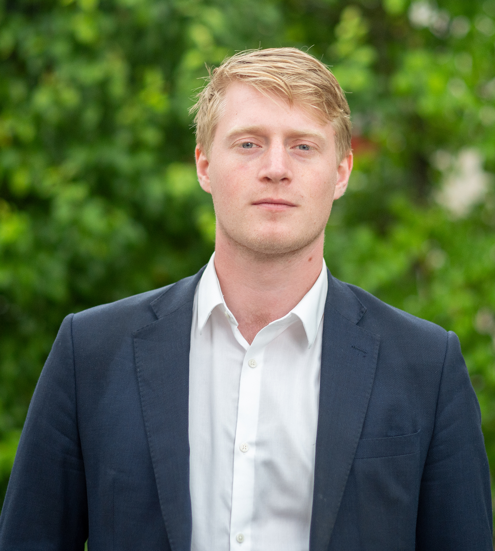 Magnus Ek, Riksdagsledamot för Centerpartiet sen valet 2018.